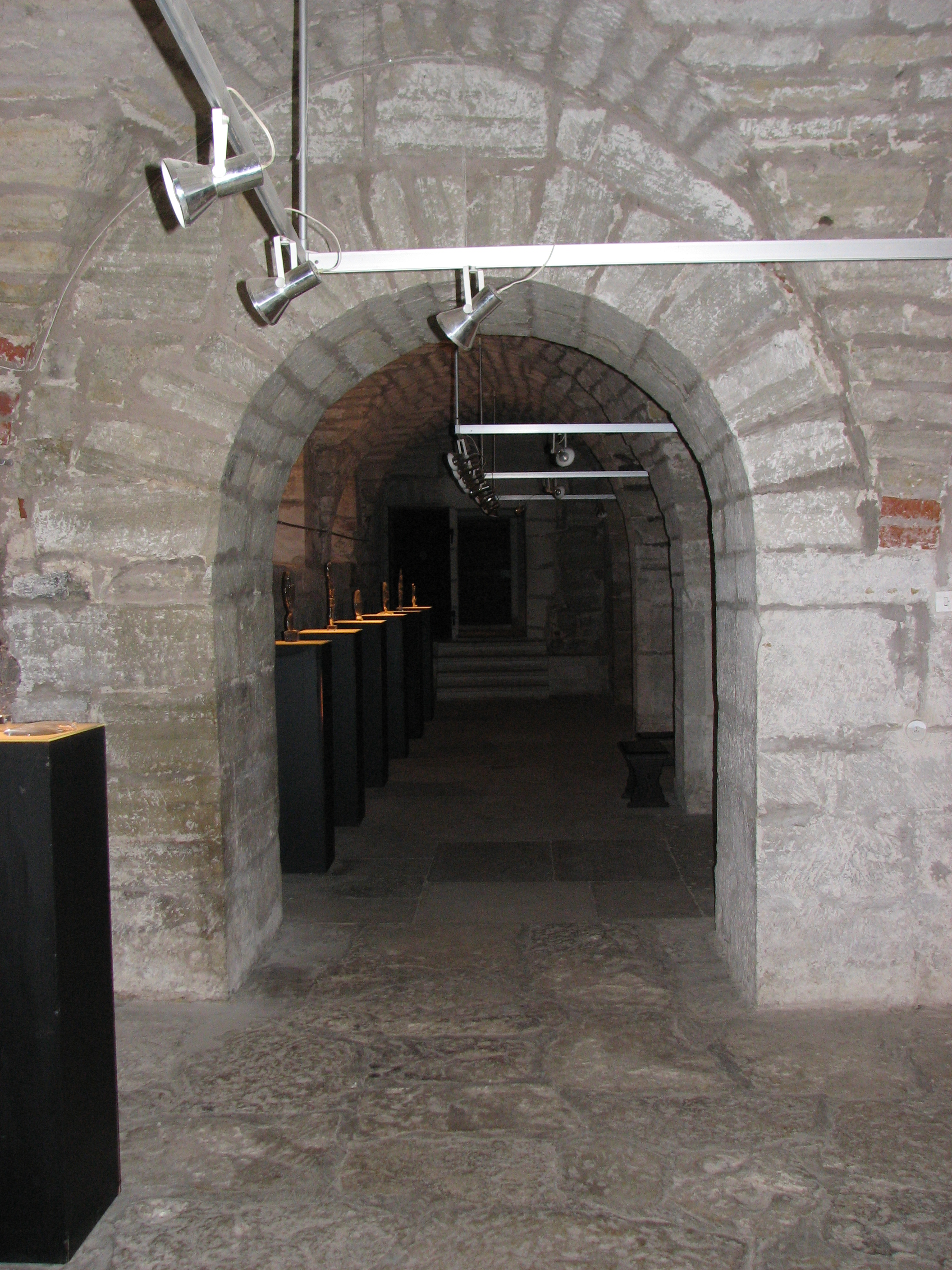 Kuressaare Castle, Saaremaa, Estonia